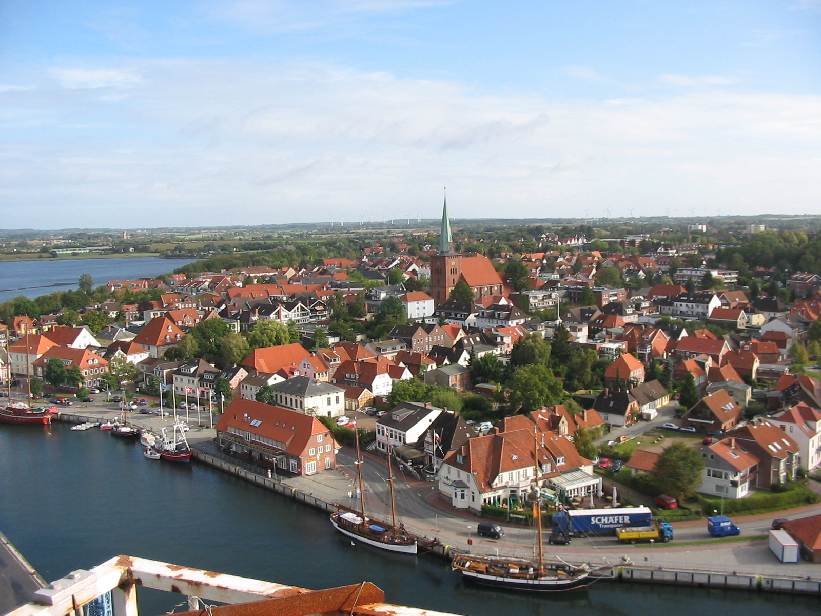 Neustadt, Hafen, Altstadt, Kirche, Übersicht vom Speicher